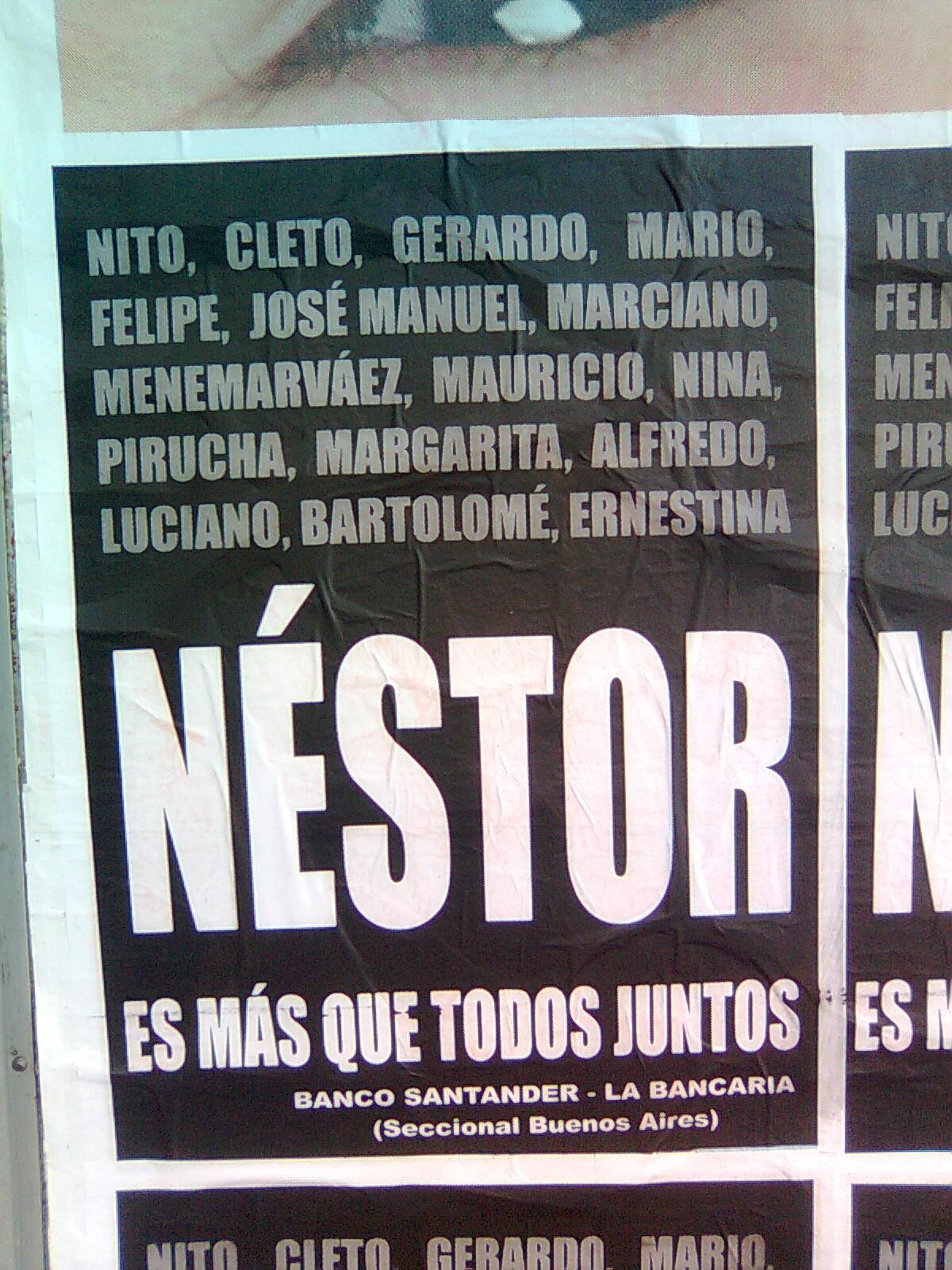 Afiche de apoyo al ex presidente argentino y actual lider del Partido Justicialista, Néstor Kirchner, realizado por un sector del Sindicato de Empleados Bancarios (La Bancaria).